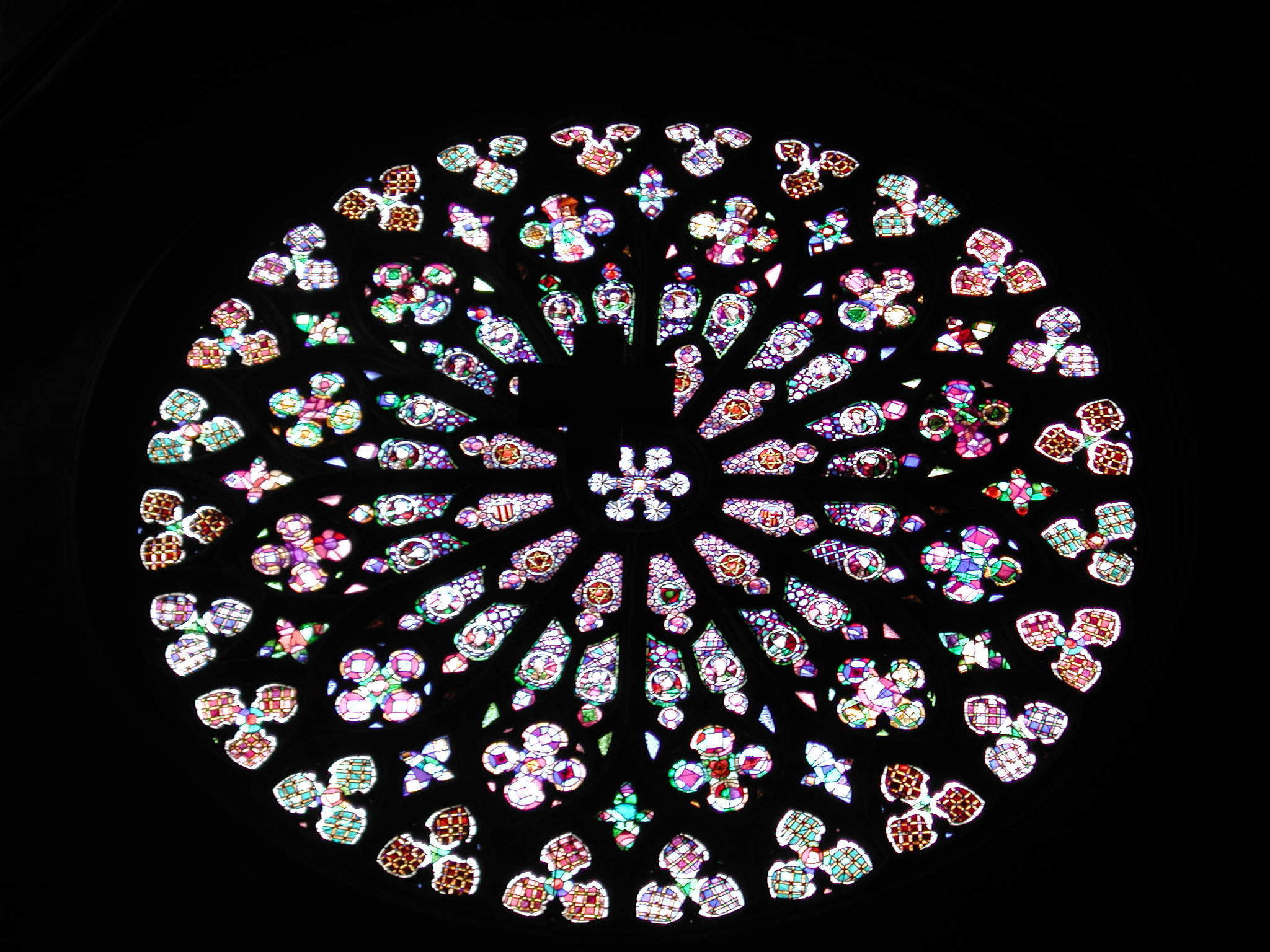 Santa María del Pí, Barcelona, rosone interno Barcelona